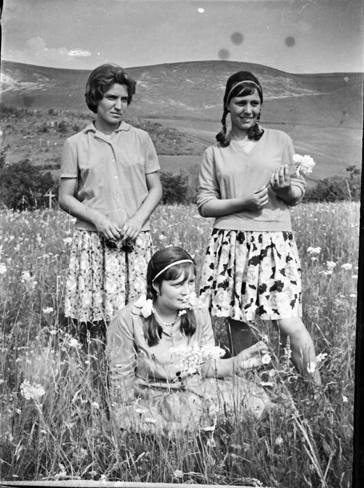 Adolescente din Aruncuta ,anul 1963 - Arhiva Mihai Chereches